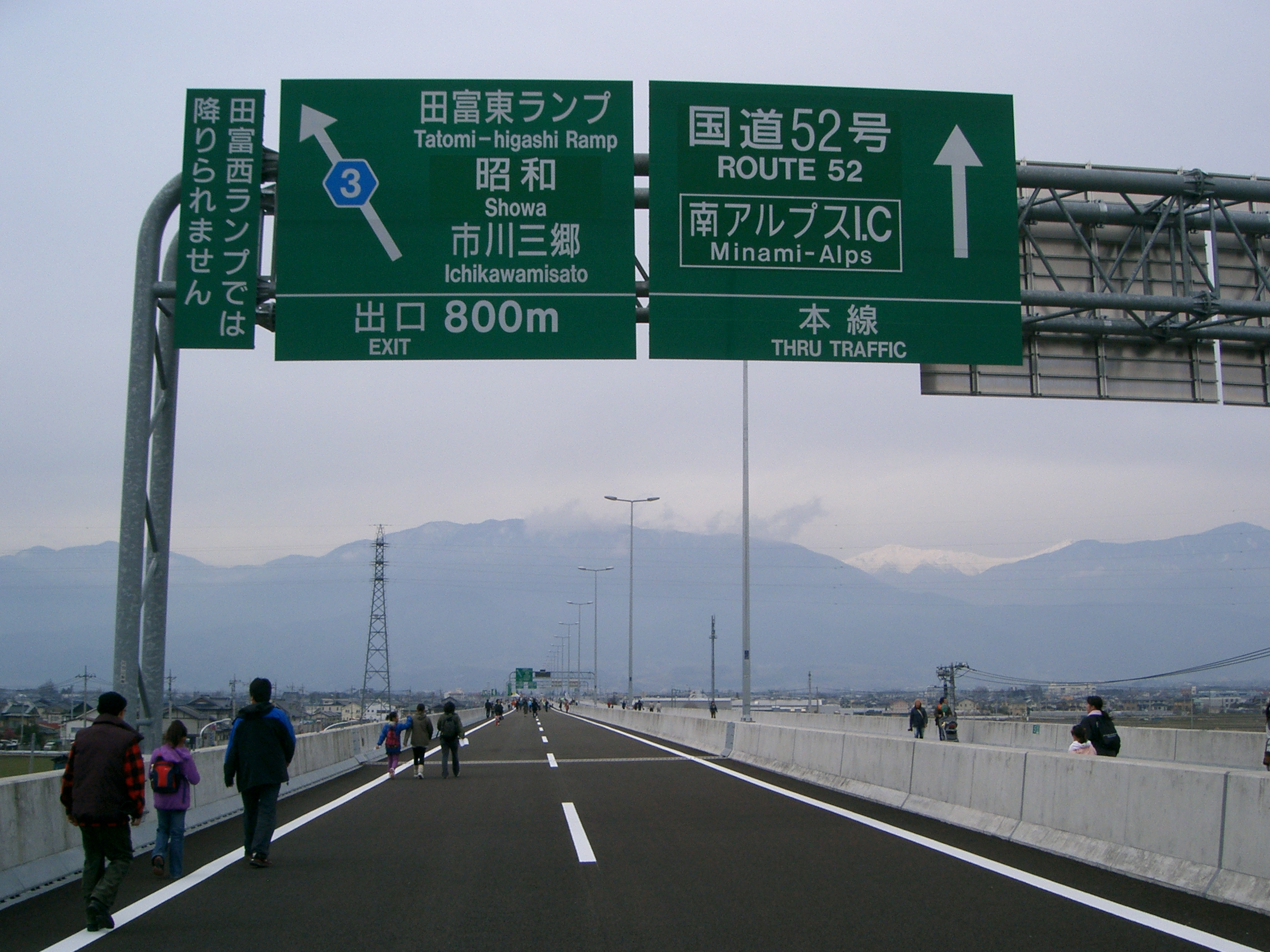 新山梨環状道路南部区間 外廻り田富東ランプ